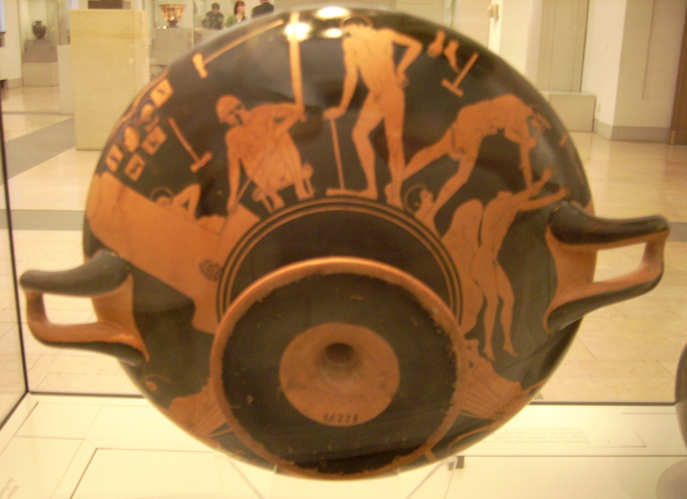 Aussenbild des namengebenden Werkes des Erzgießerei-Malers: Blick in eine Werkstatt eines attischen Bronzebildners, Durchmesser 30,5 cm, in Vulci gefunden, 1837 für die Antikensammlung Berlin erworben